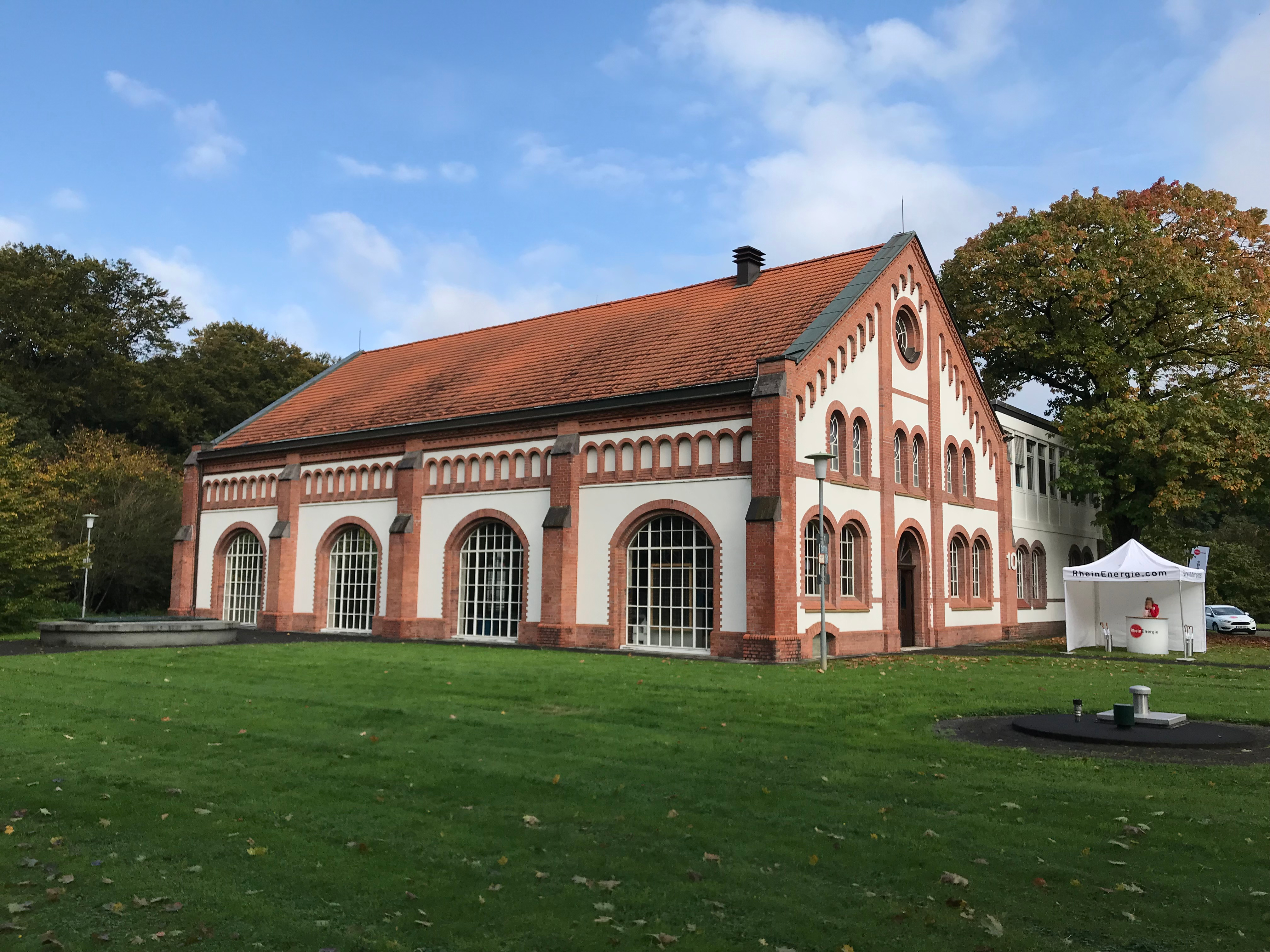 Ansicht des historischen Wasserwerks in Köln-Westhoven.